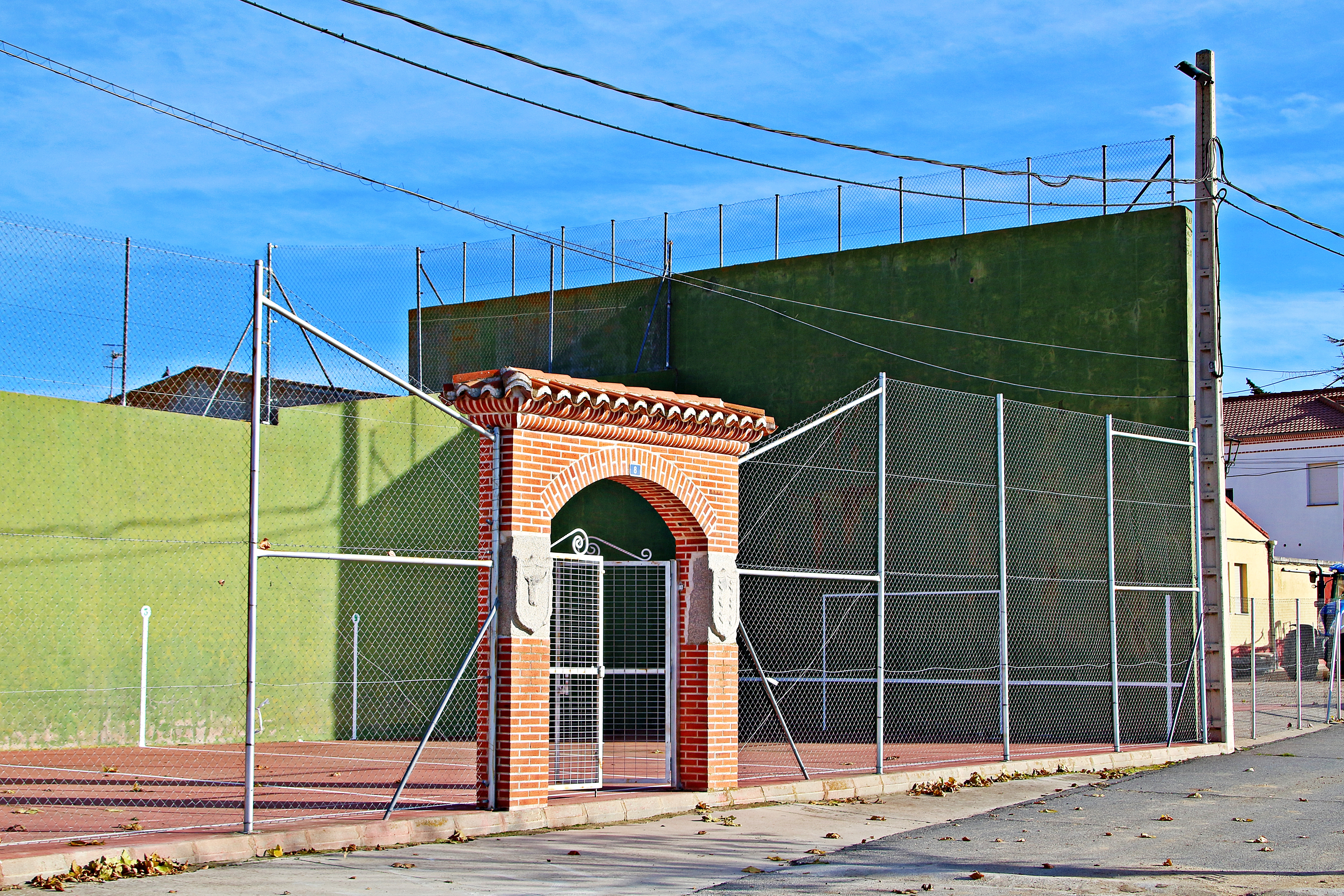 Cisla municipio de la comarca de La Moraña en la provincia de Ávila